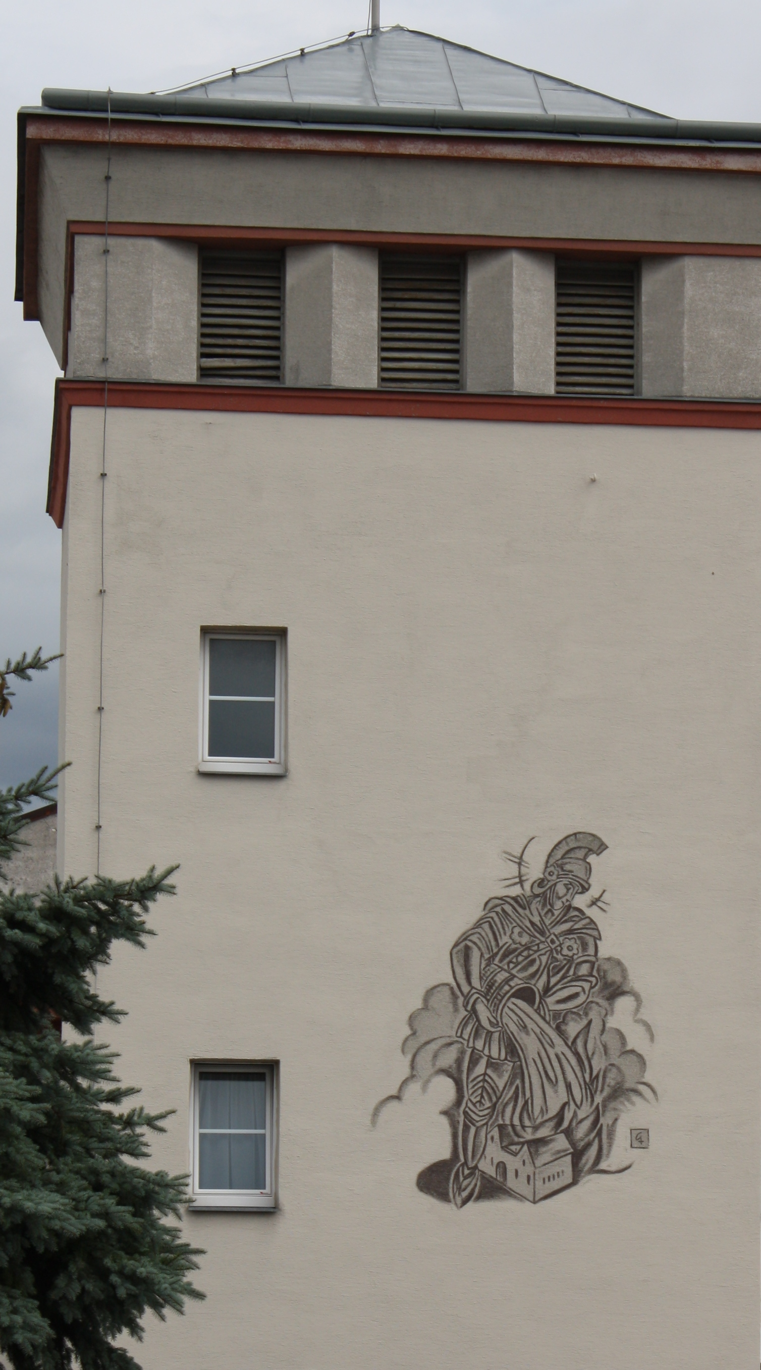 Wandmalerei Heiliger Florian von Leopold Grausam jun. am alten Feuerwehrturm (heute Ortsstelle des Roten Kreuzes) in Deutsch-Wagram in Niederösterreich.